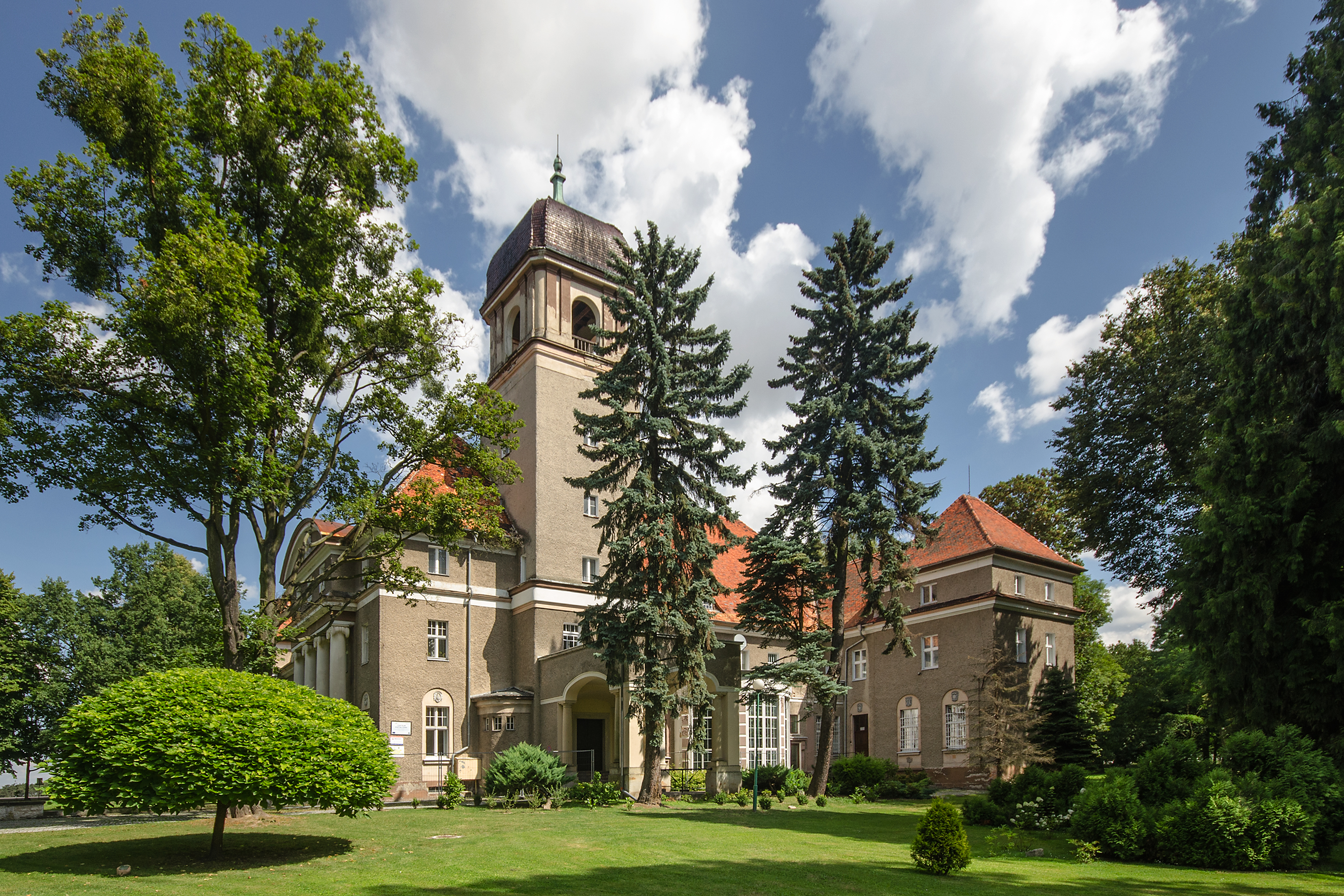 Łosiów, park pałacowy, XVIII